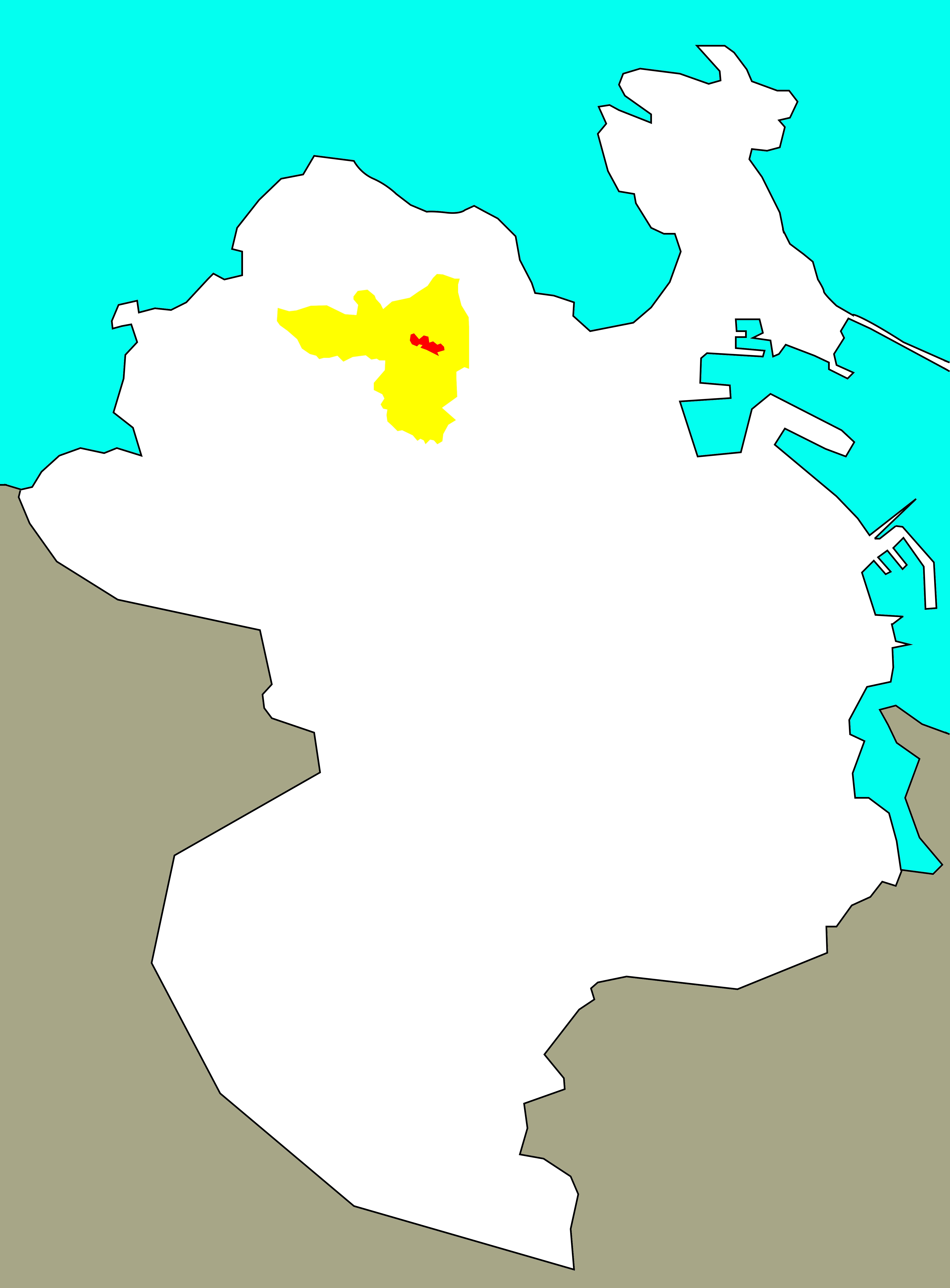 Situación de San Pedro de Visma no "barrio-territorio" homónimo.[1]